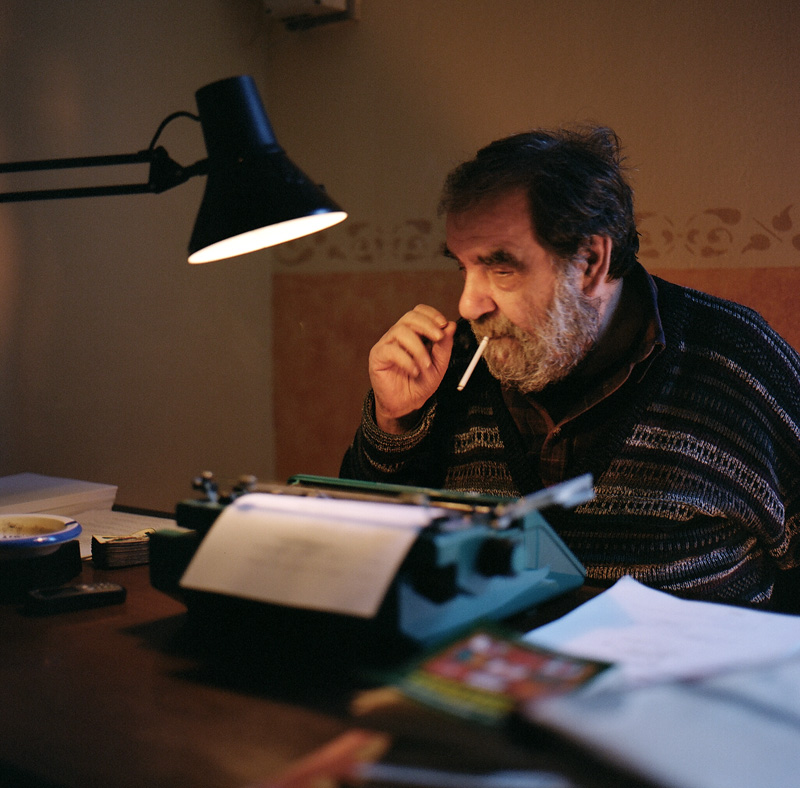 Franco Scaldati al lavoro nel suo studio. photo copyright Pietro Motisi 2008